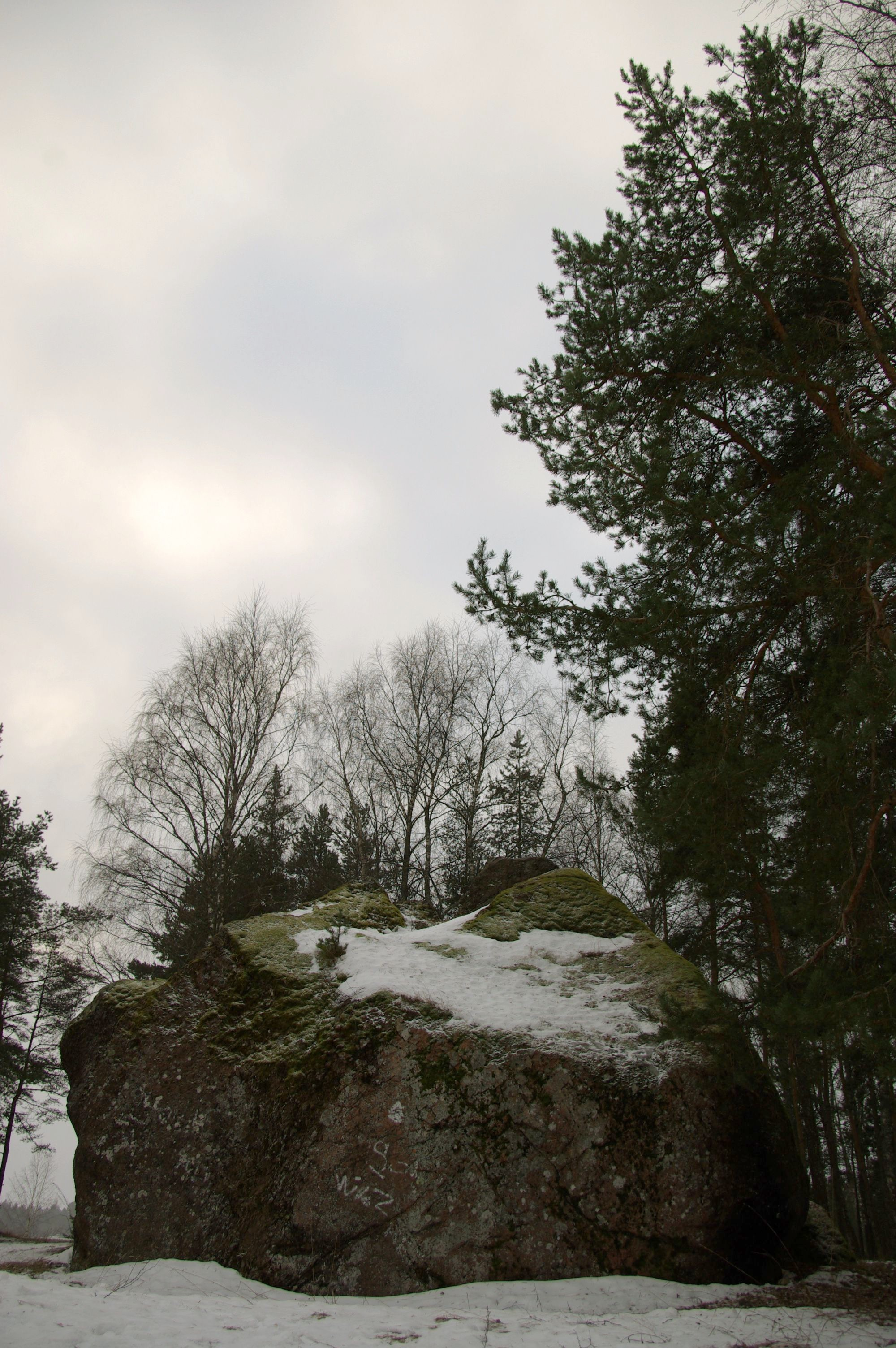 asub Tallinnas Männikul Raku järve ääres